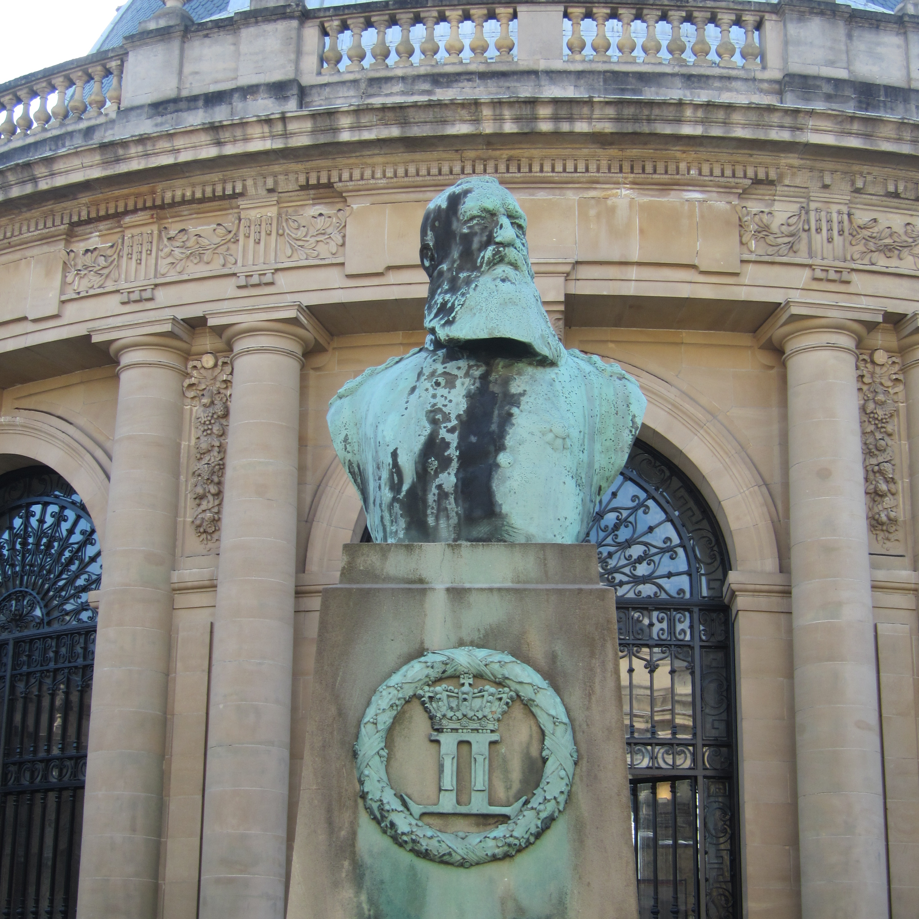 Buste Koning Leopold II in de binnentuin van het Koninklijk Museum voor Midden Afrika te Tervuren